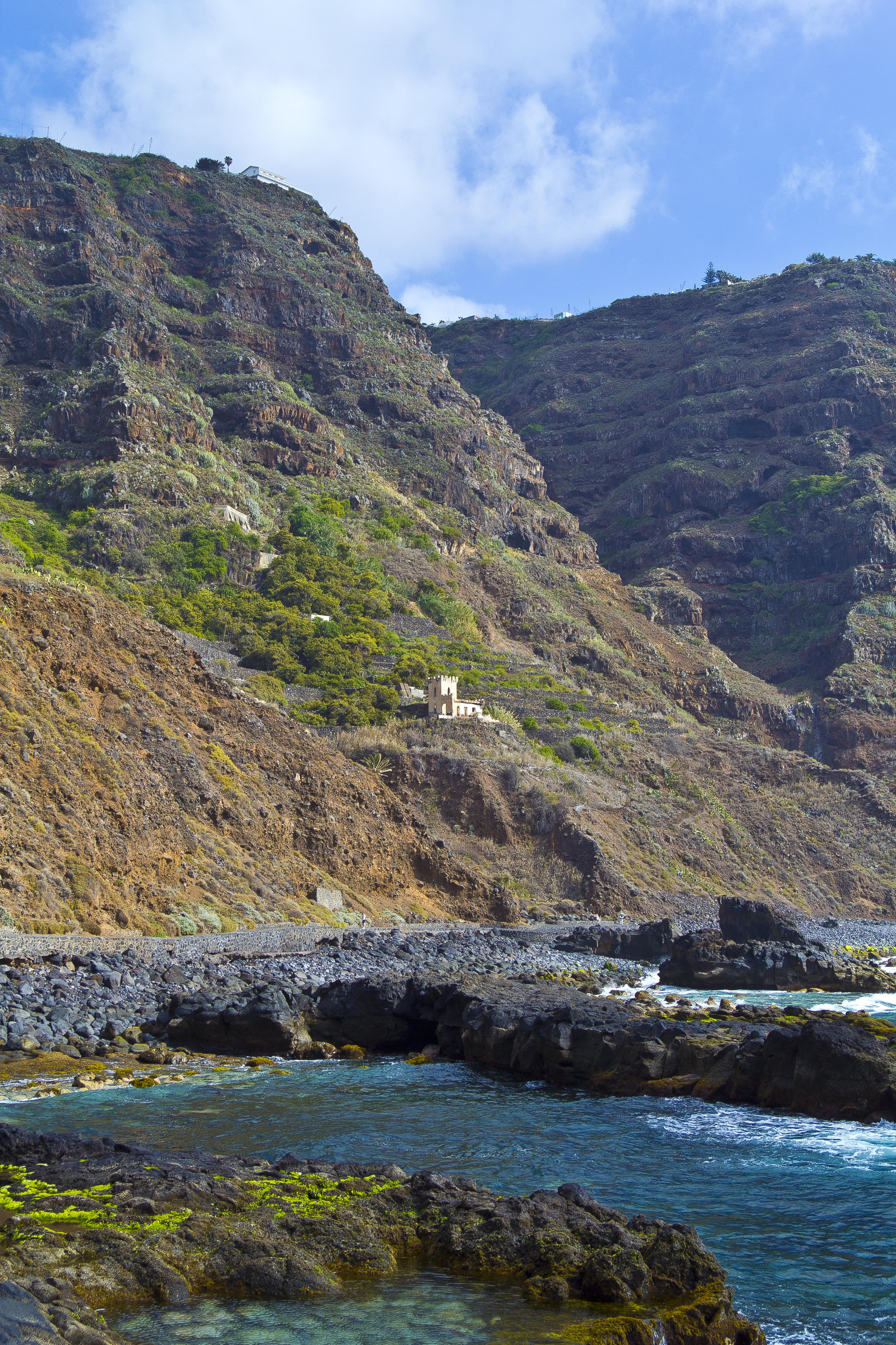 Landhaus der Familie Domiínguez in Mesa del Mar (Tacoronte)